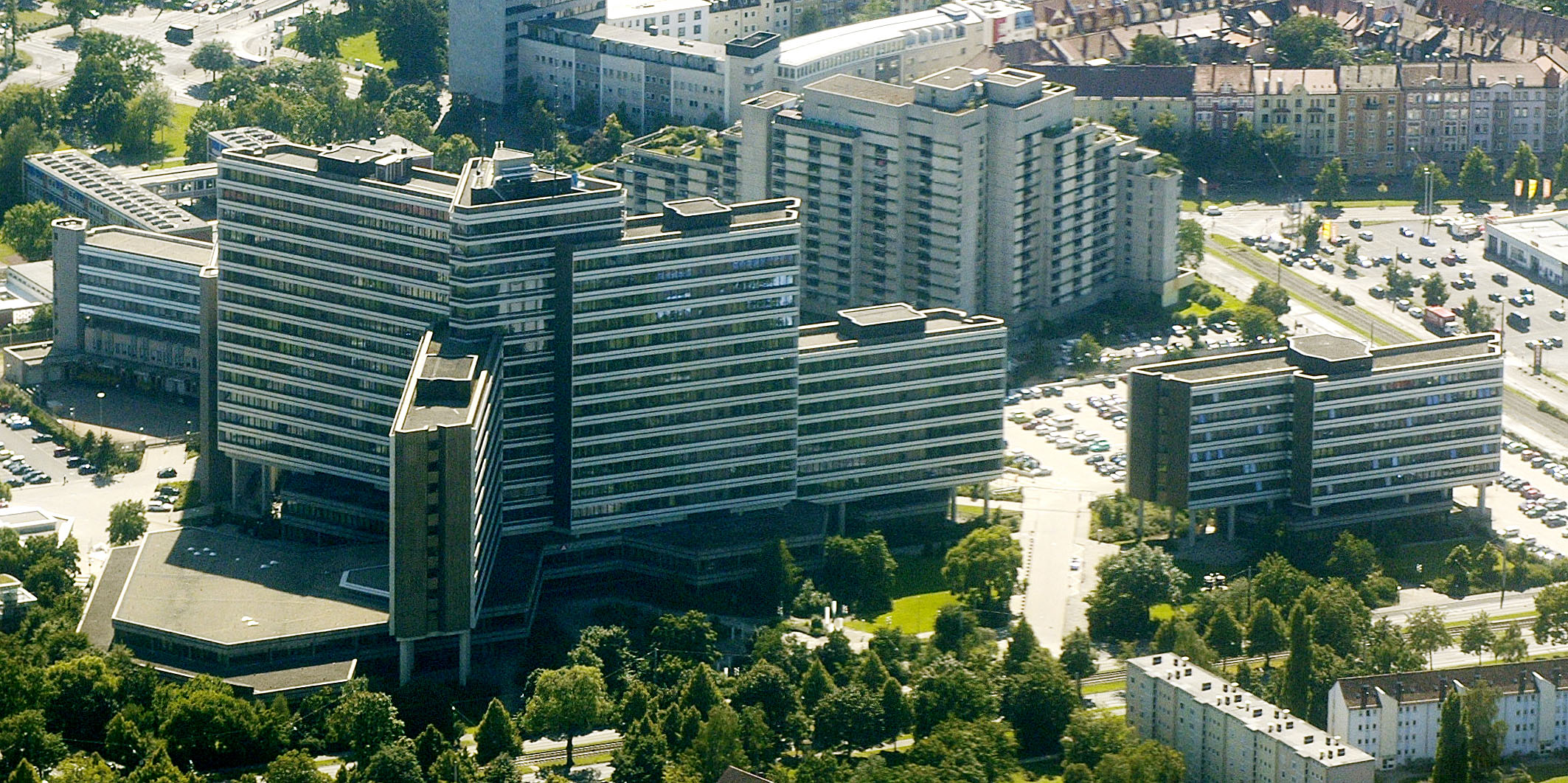 Luftaufnahme des Verwaltungszentrums der Bundesagentur für Arbeit in Nürnberg. Sitz der Zentrale, des IT-Systemhauses und der Regionaldirektion Bayern.